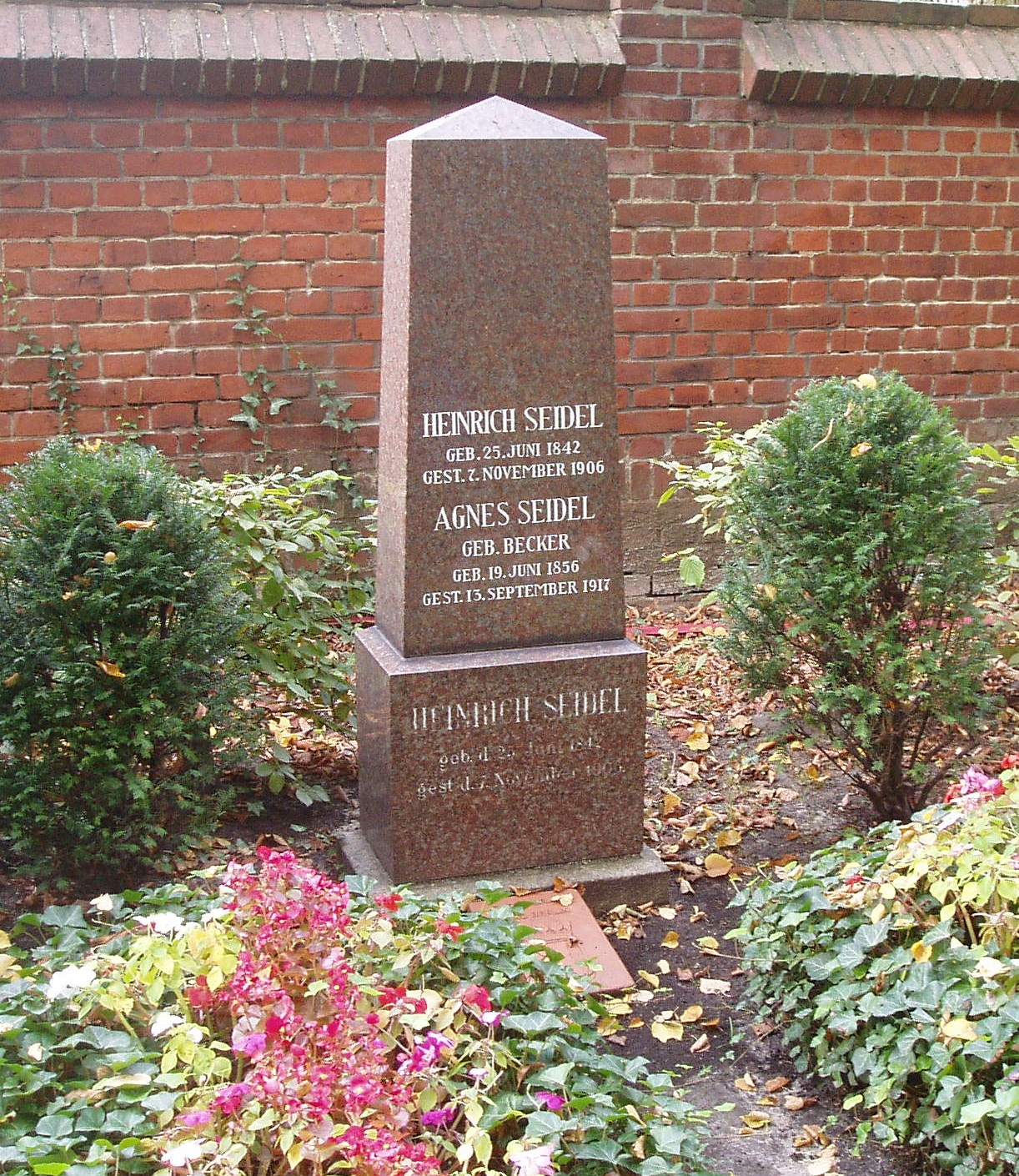 Ehrengrab Heinrich Seidel. Neues Foto nach Restaurierung des Schriftzuges anlässlich des 100. Todestages am 07.11.2006